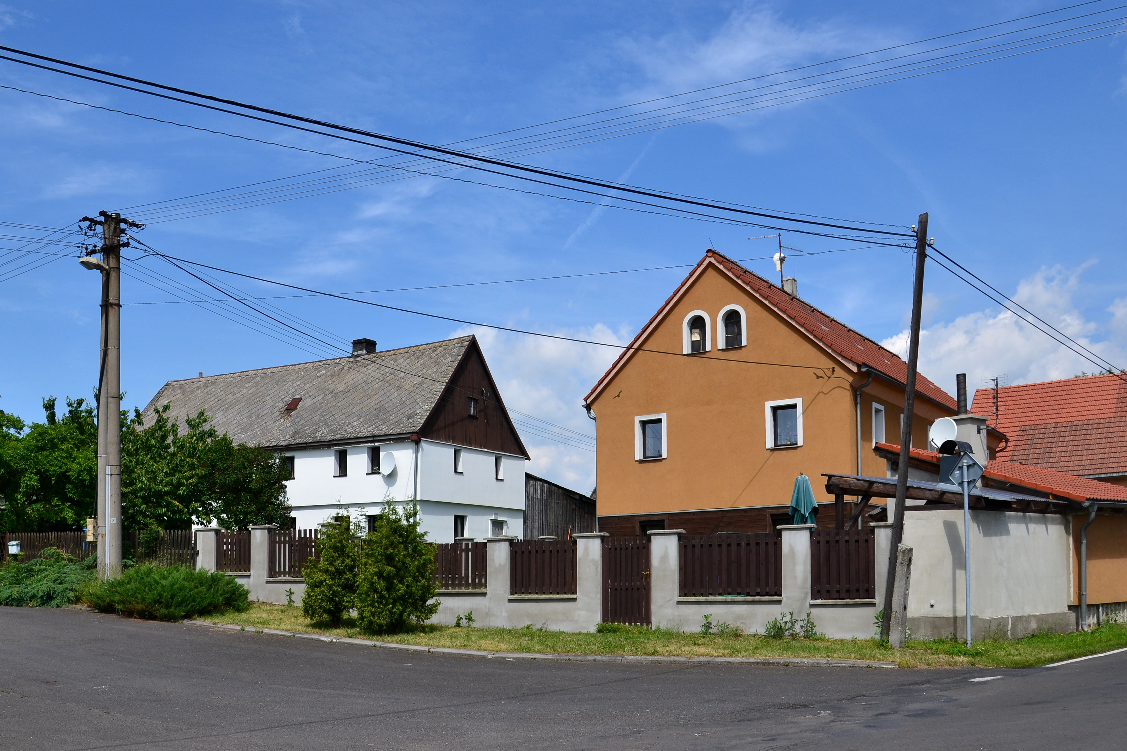 Mořičov - domy u návsi